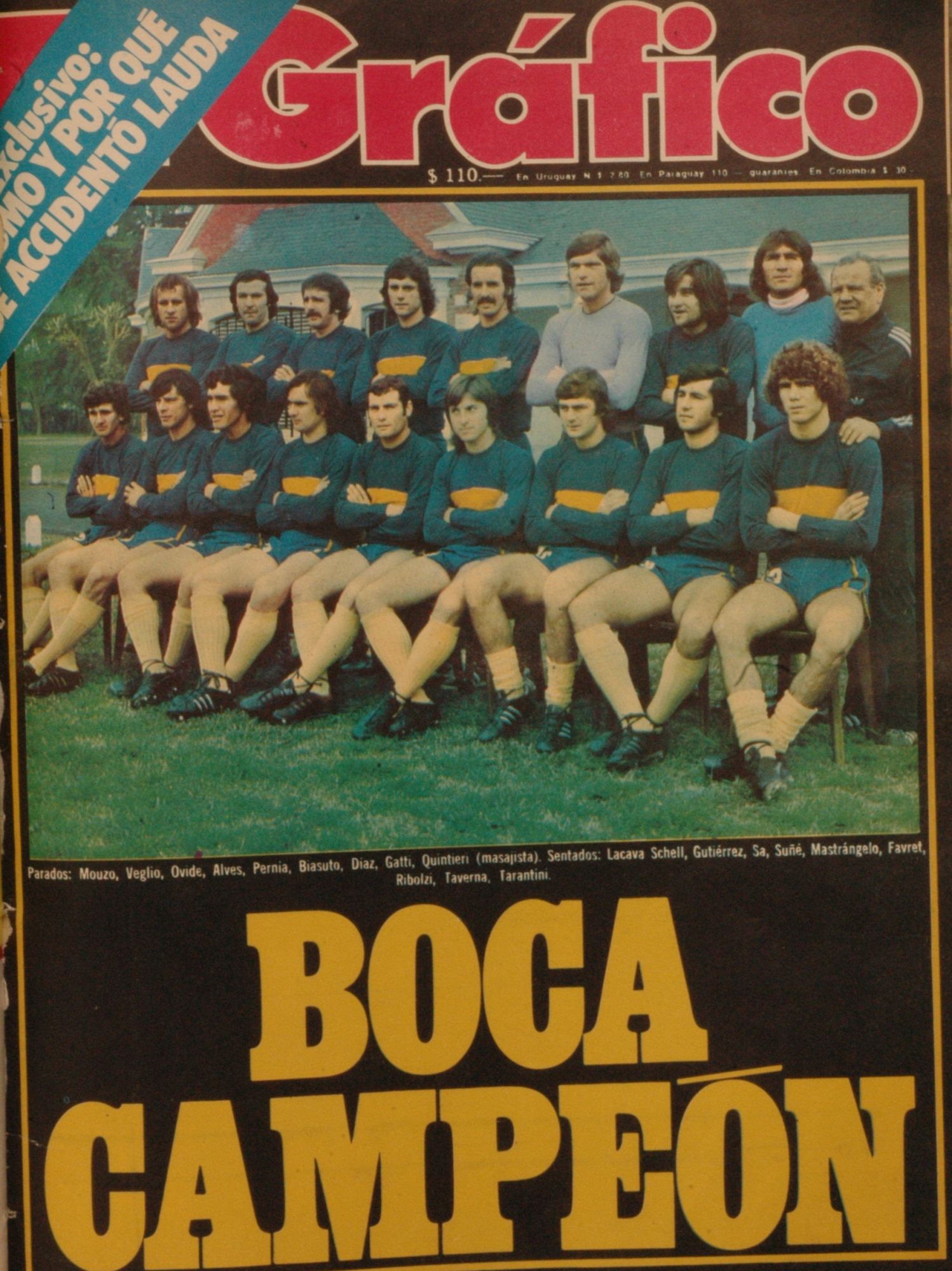 El Grafico del 10 de Agosto de 1976. Edicion 2966